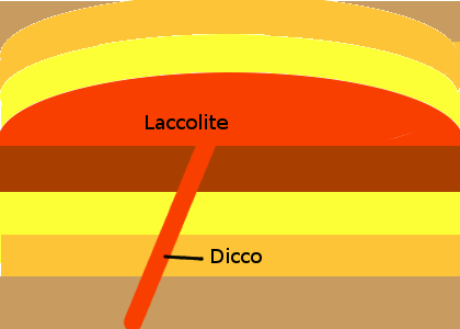 Laccolith